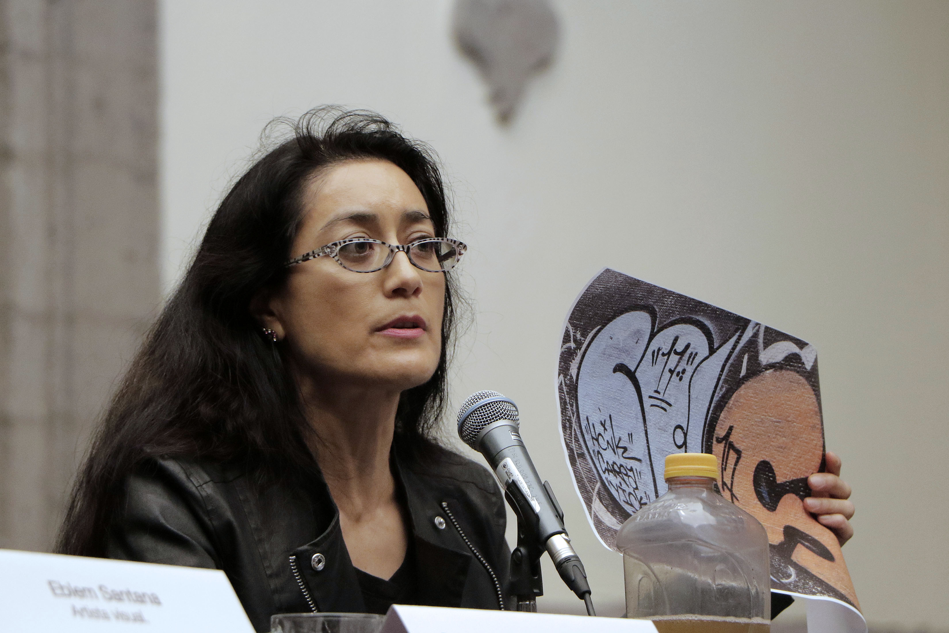 Sábado 4 de agosto Museo de la Ciudad de México, se llevó a cabo un debate en torno al grafiti como medio de expresión, con la participación de la artista plástica y expositora Avelina Lésper y sus invitados Guillermo Heredia S.R. Niuk y el artista plástico Eblem Santana. Fotografía: Tania Victoria/ Secretaría de Cultura CDMX